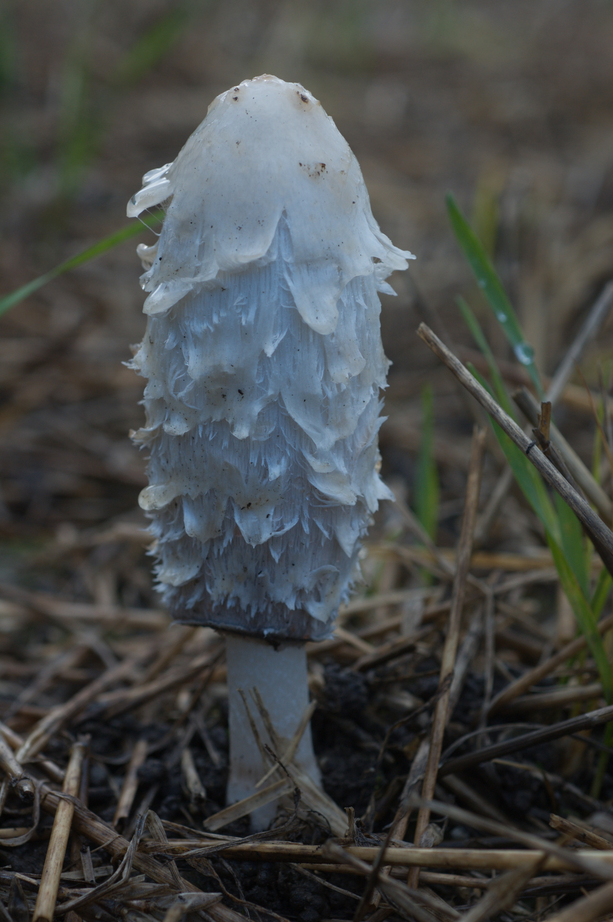 Fungu, Coptinus Comatus Blekkmatsopp